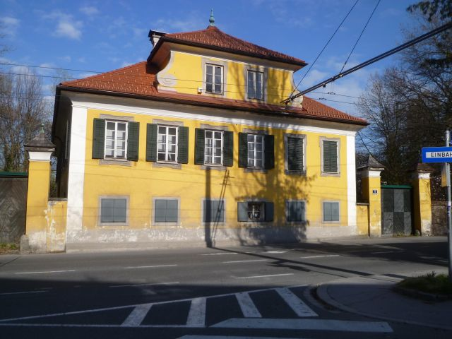 Rauchenbichlerhof in Salzburg von Südosten (Straßenseite)